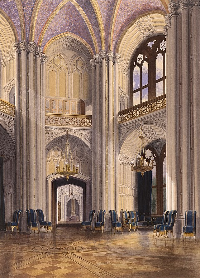 Schloss Babelsberg. Tanzsaal. F. Riegel, Potsdam 1853, Farblithografie von Loeillot nach Carl Graeb, Bild: 39 × 28,5 cm